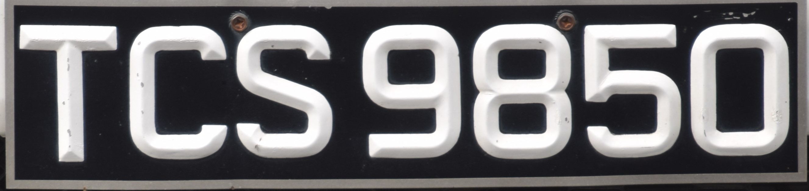 Kentekenplaat Trinidad en Tobago